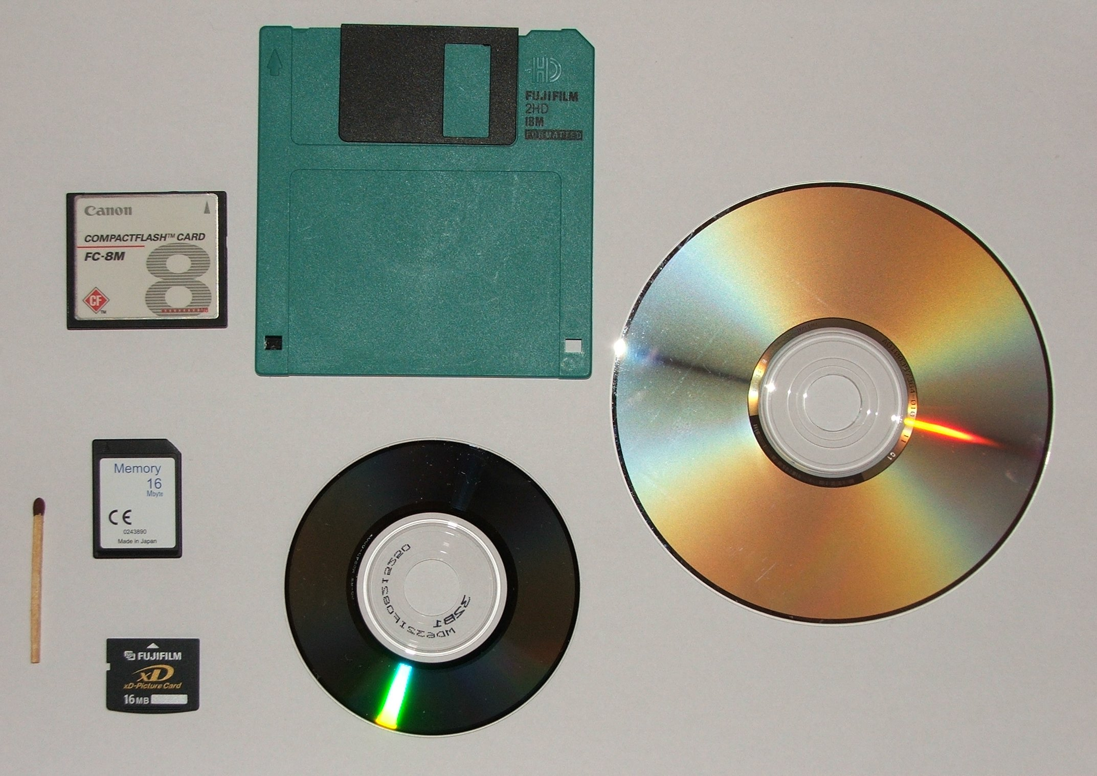 unterschiedliche Wechseldatenträger; links oben eine CompactFlash-, darunter eine SD- und ganz unten eine xD-Speicherkarte, dann oben rechts daneben (grün gefärbt) eine sogenannte 3,5-Zoll-(Floppy-)Diskette (Maße: 9 cm breit und 9,4 cm tief), darunter eine dunkel gefärbte (u.a. mit „MOD“ beschriftete und daher mutmaßlich) Magneto Optical Disk (ohne Schutzhülle; Breite [für gewöhnlich] mit Hülle: 9 cm) und rechts eine Compact Discs (Durchmesser: 12 cm); zudem ganz links unten ein Zündhölzchen (welches wohl als Maßstäbchen dienen sollte)